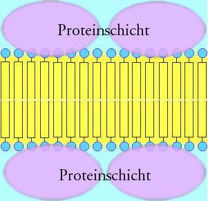 Lipid-Doppelschicht sandwich-modell; selbst erstellt; gemeinfrei